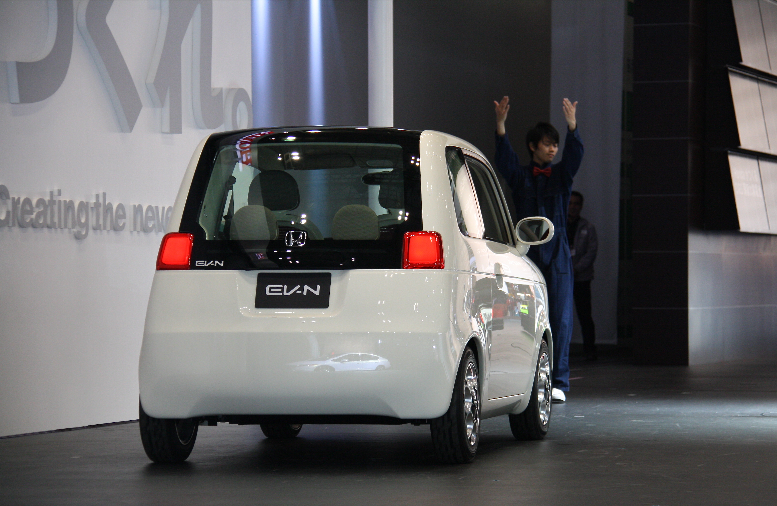 Honda EV-N (Back)